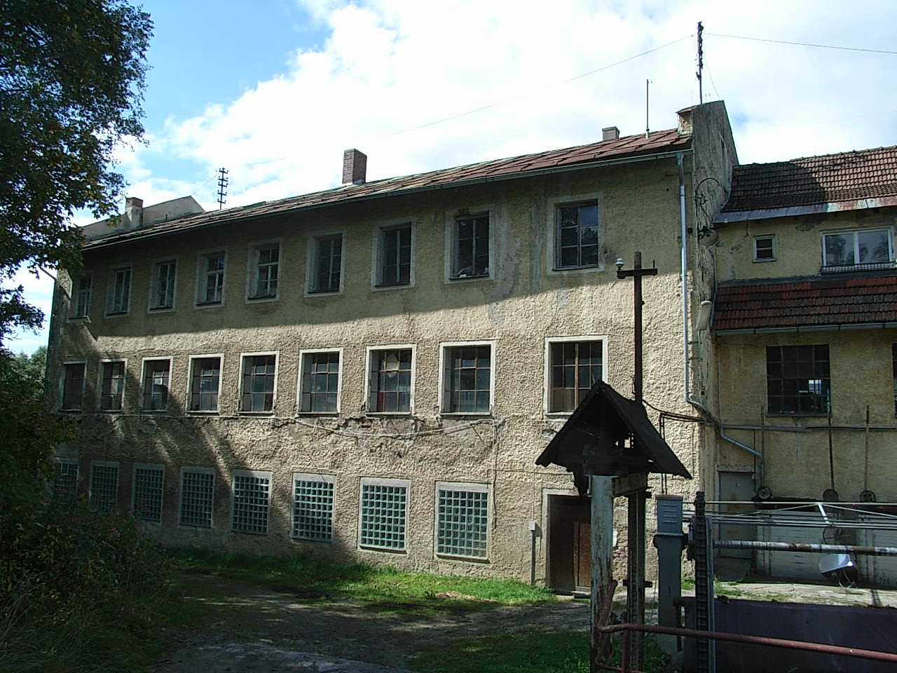 Absprengerei und Schleiferei Theresienthal